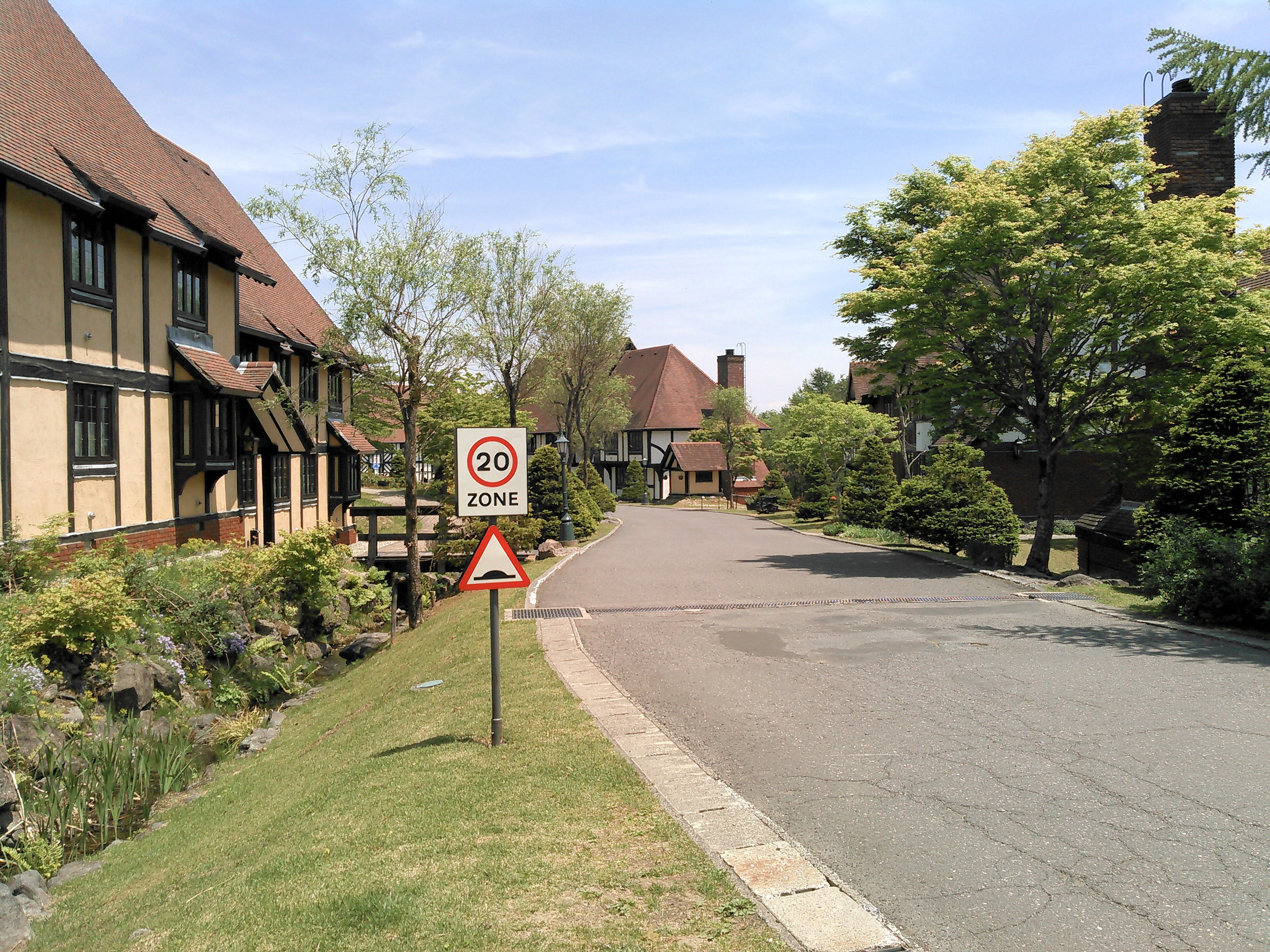 ブリティッシュヒルズ イギリス風も街並みと交通標識